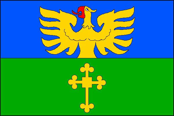 Vlajka obce Nýdek